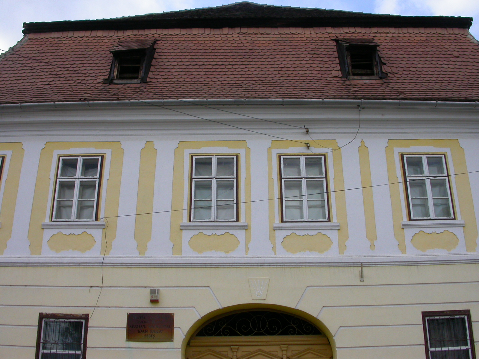 Casa Zapolya, azi Muzeul "Ioan Raica", 1664